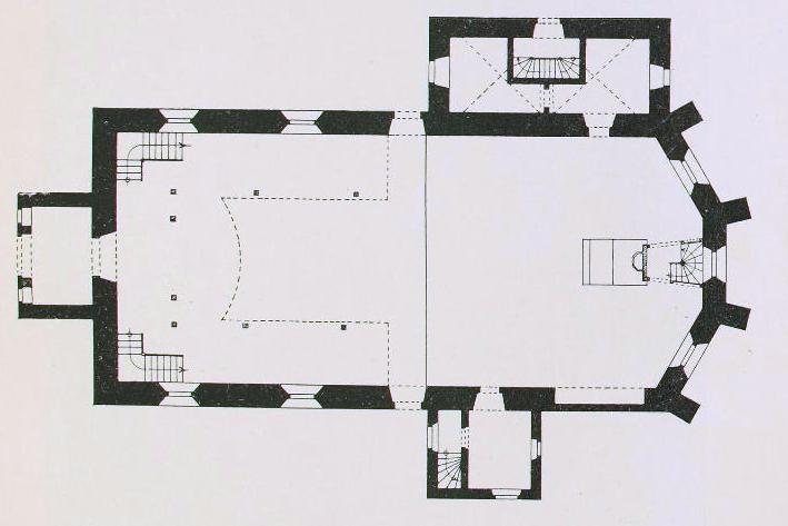 Hornjoserbsce: Podrys Malešanskeje cyrkwje spočatk 20. lětstotka.